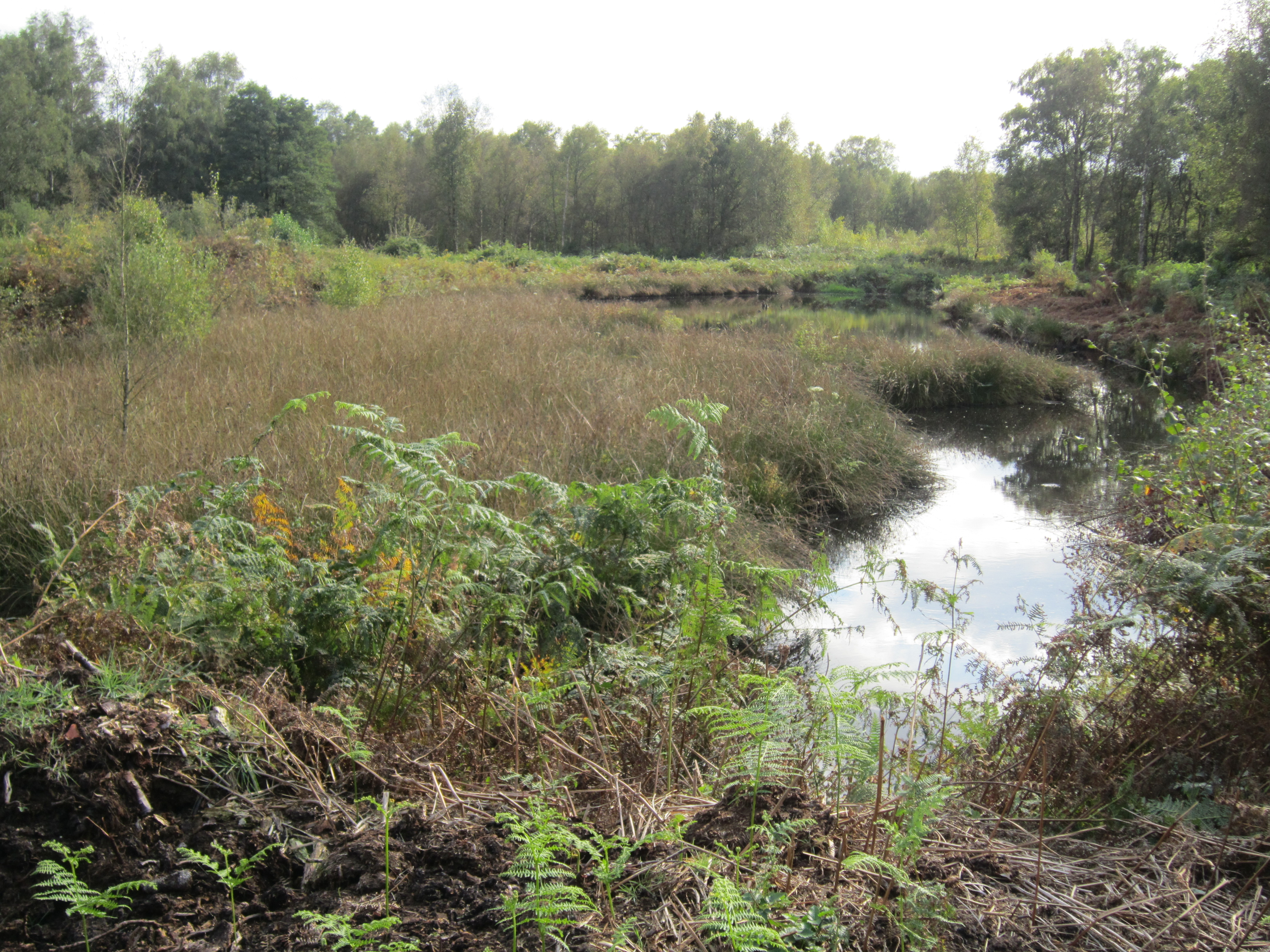 Steinfelder Moor am Wassenbergs Damm in Kroge